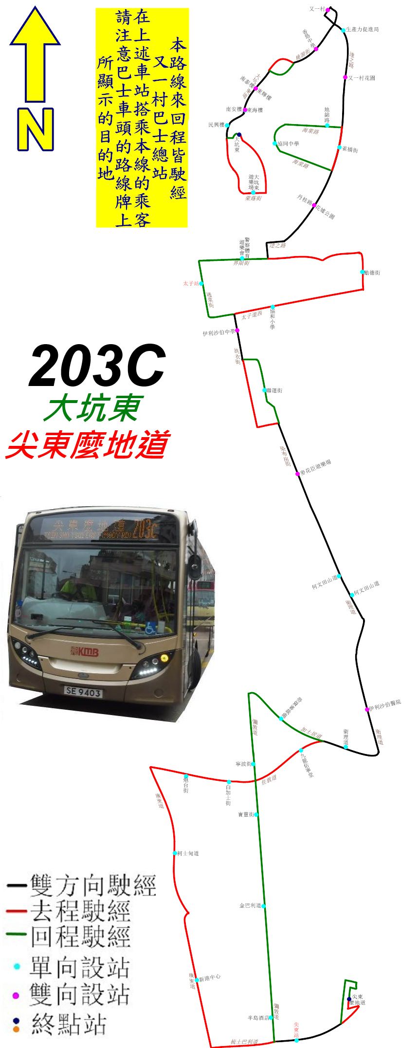 中文（香港）: 九巴203C線的走線圖，惟暫時沒有巴士相